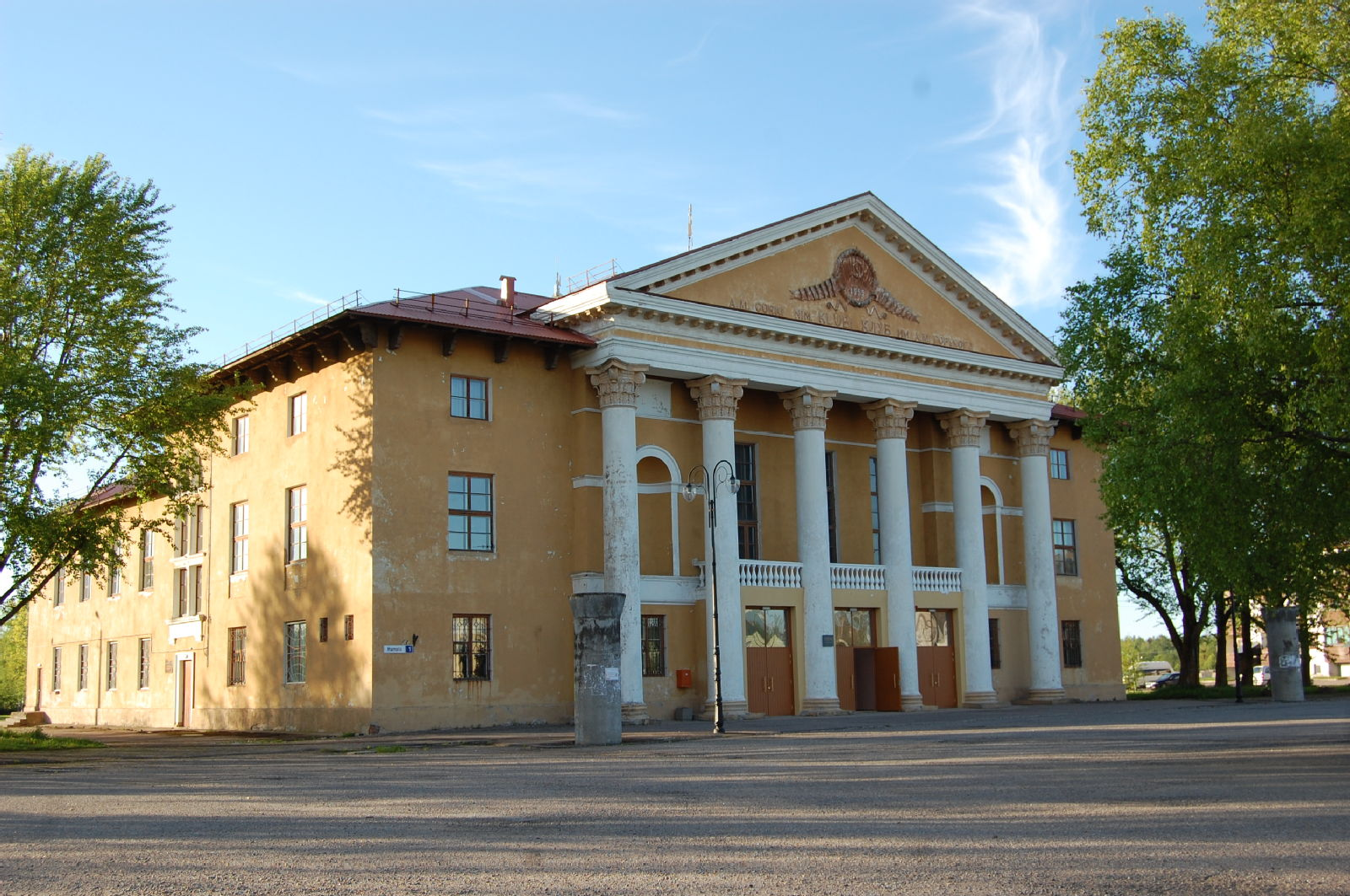 клуб Сомпа